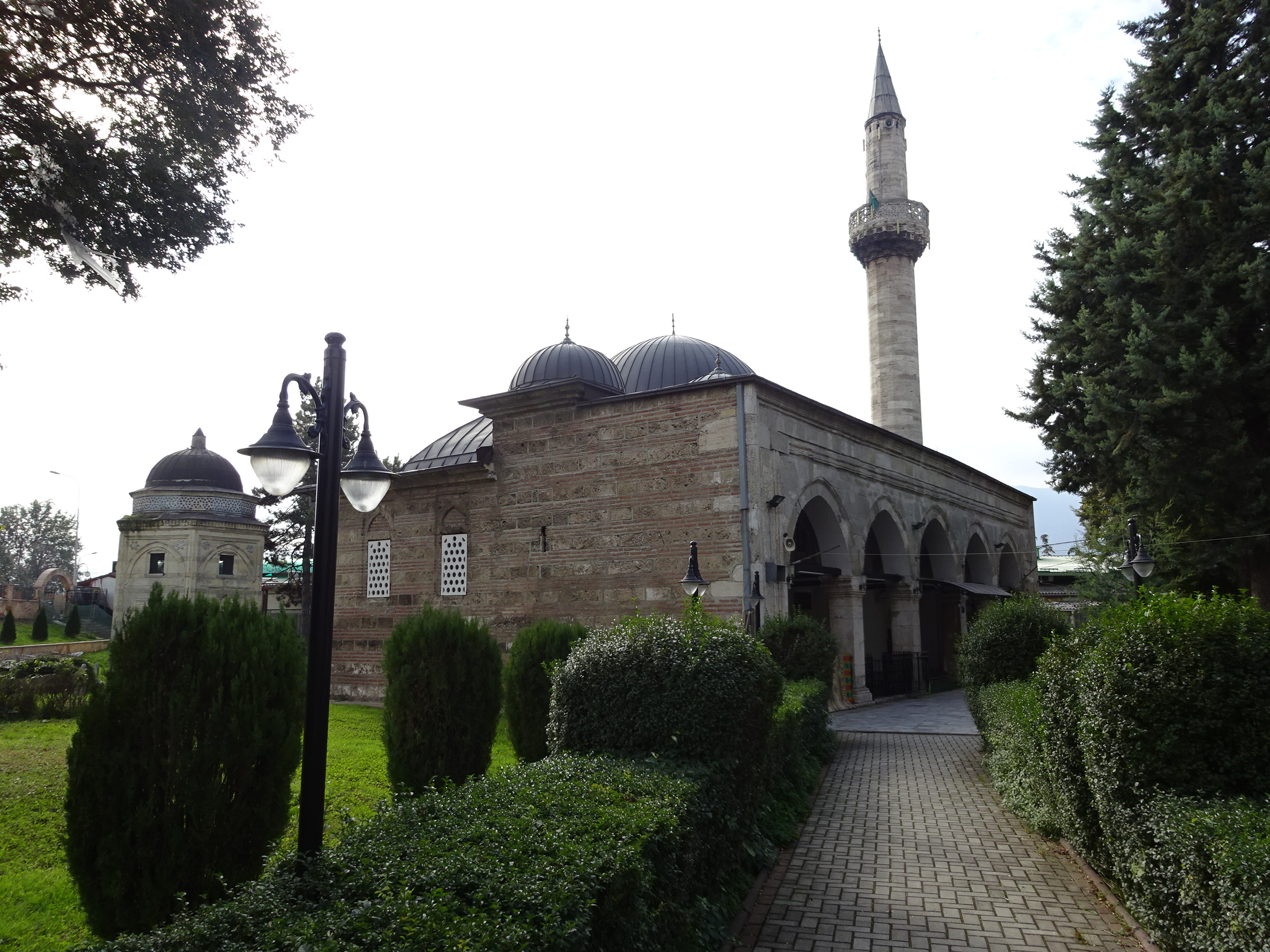 Исхак Бегова Џамија Скопје Ова е фотографија на споменик на културата во Македонија со типски код: A02This is a a photo of a cultural monument in North Macedonia with type id: A02